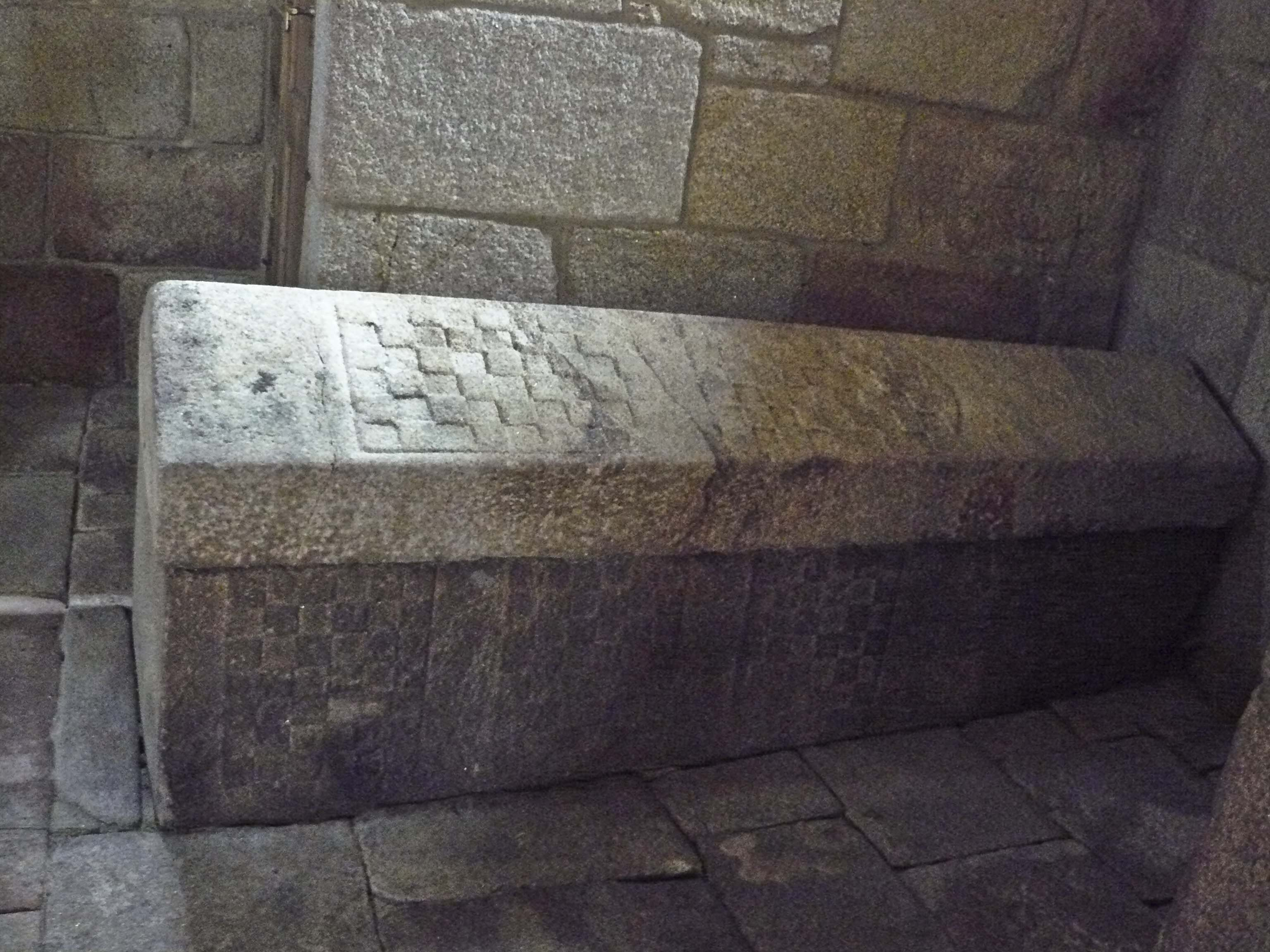 Lápida sepulcral 1-Mosteiro de Aciveiro